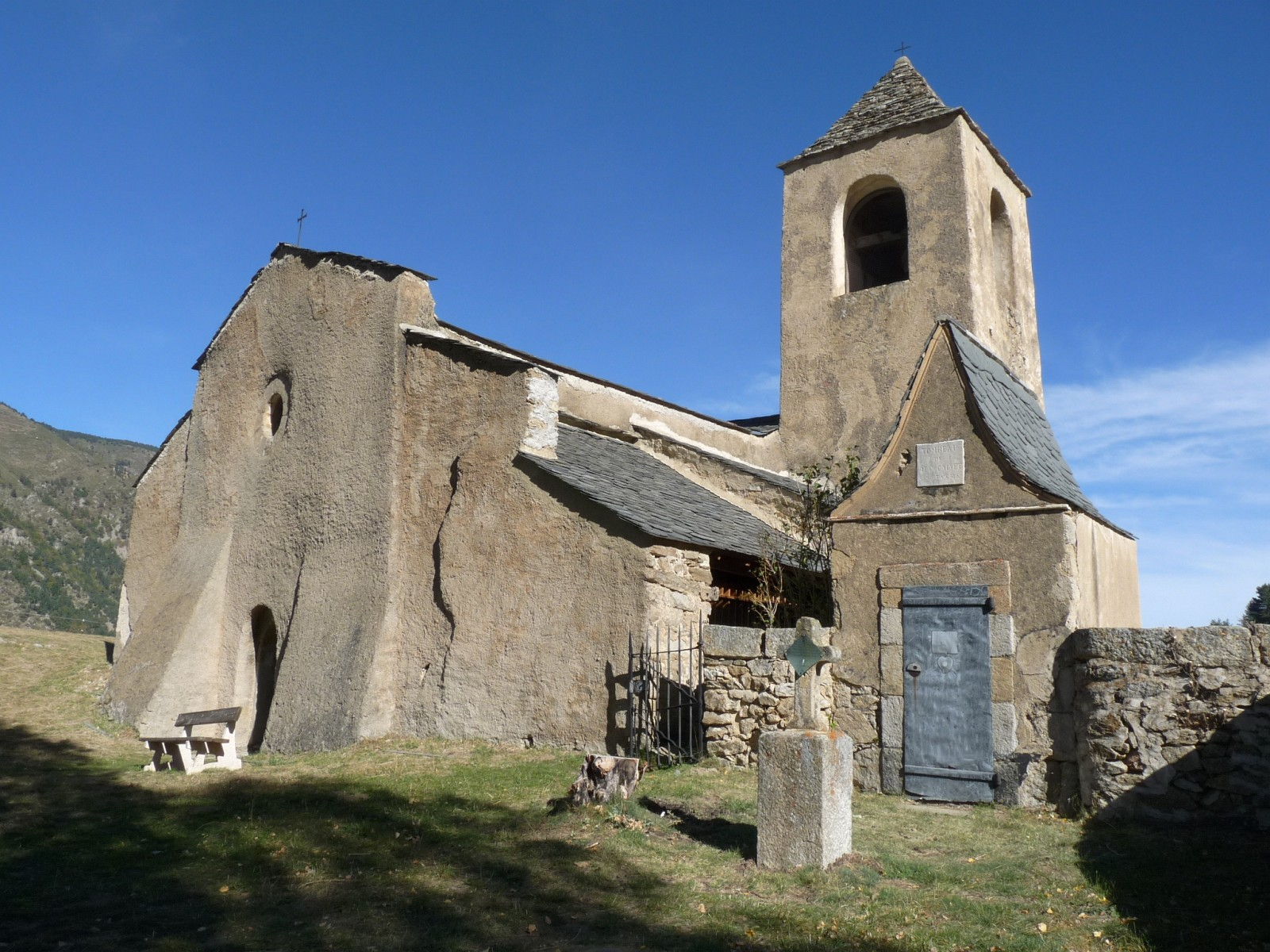 Eglise de Prats-Balaguer, Pyrénées-Orientales, France